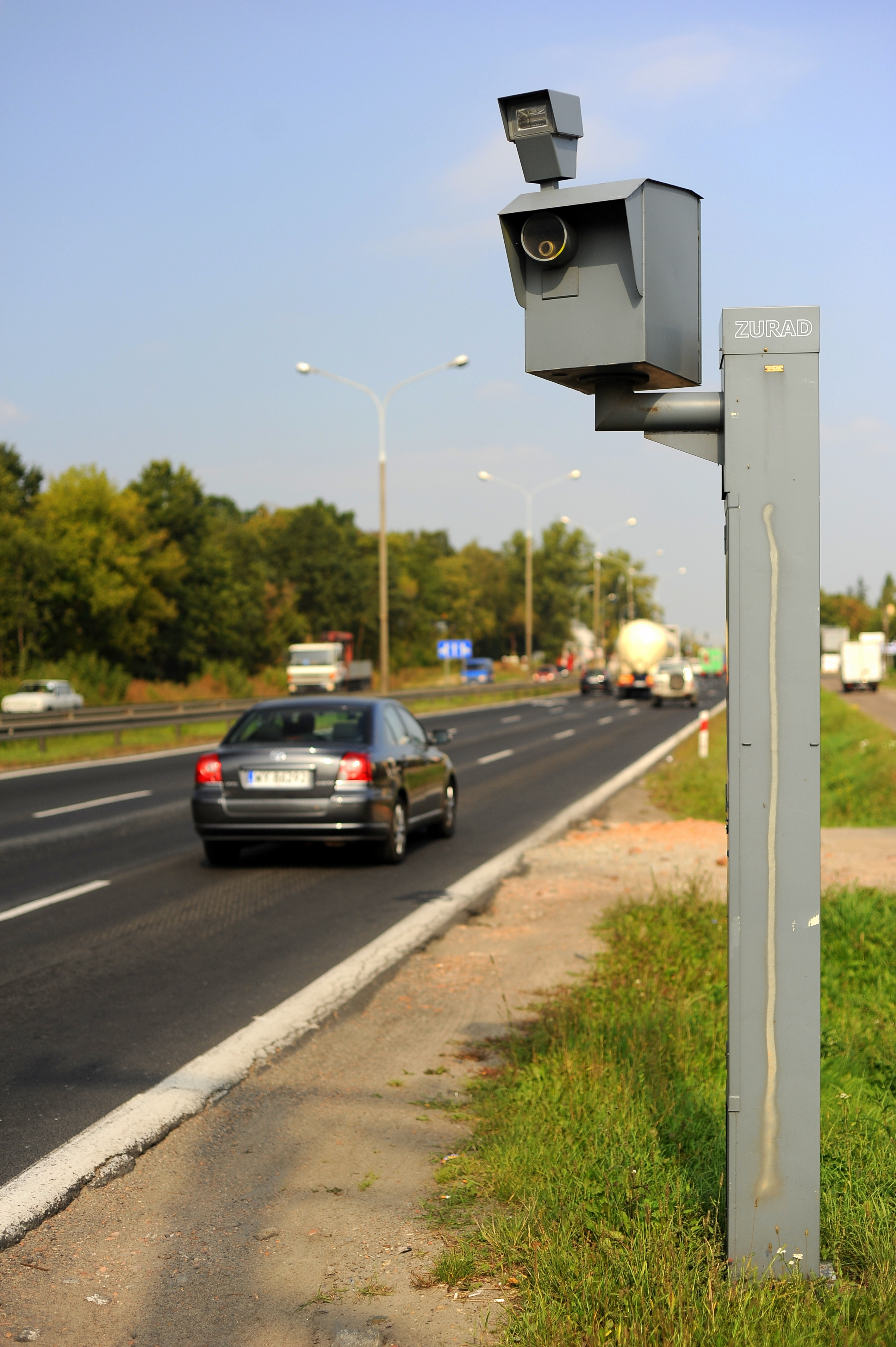 Fotoradar